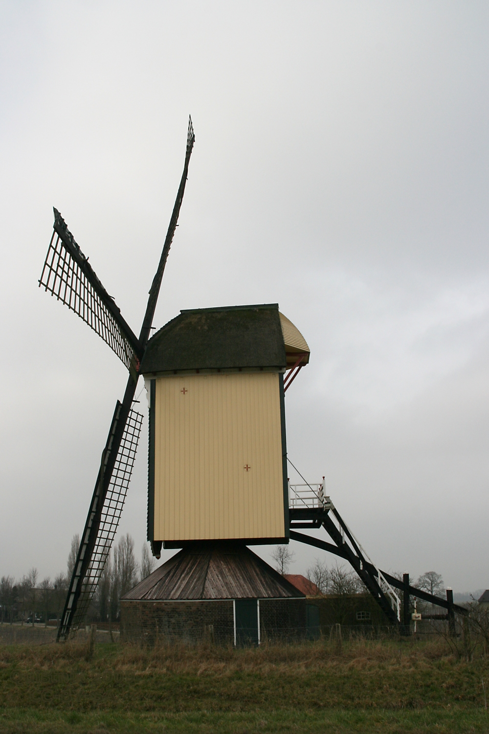 Batenburg: Standerdmolen, gezien vanaf de dijk. Niet de foto staat scheef, maar de molen!